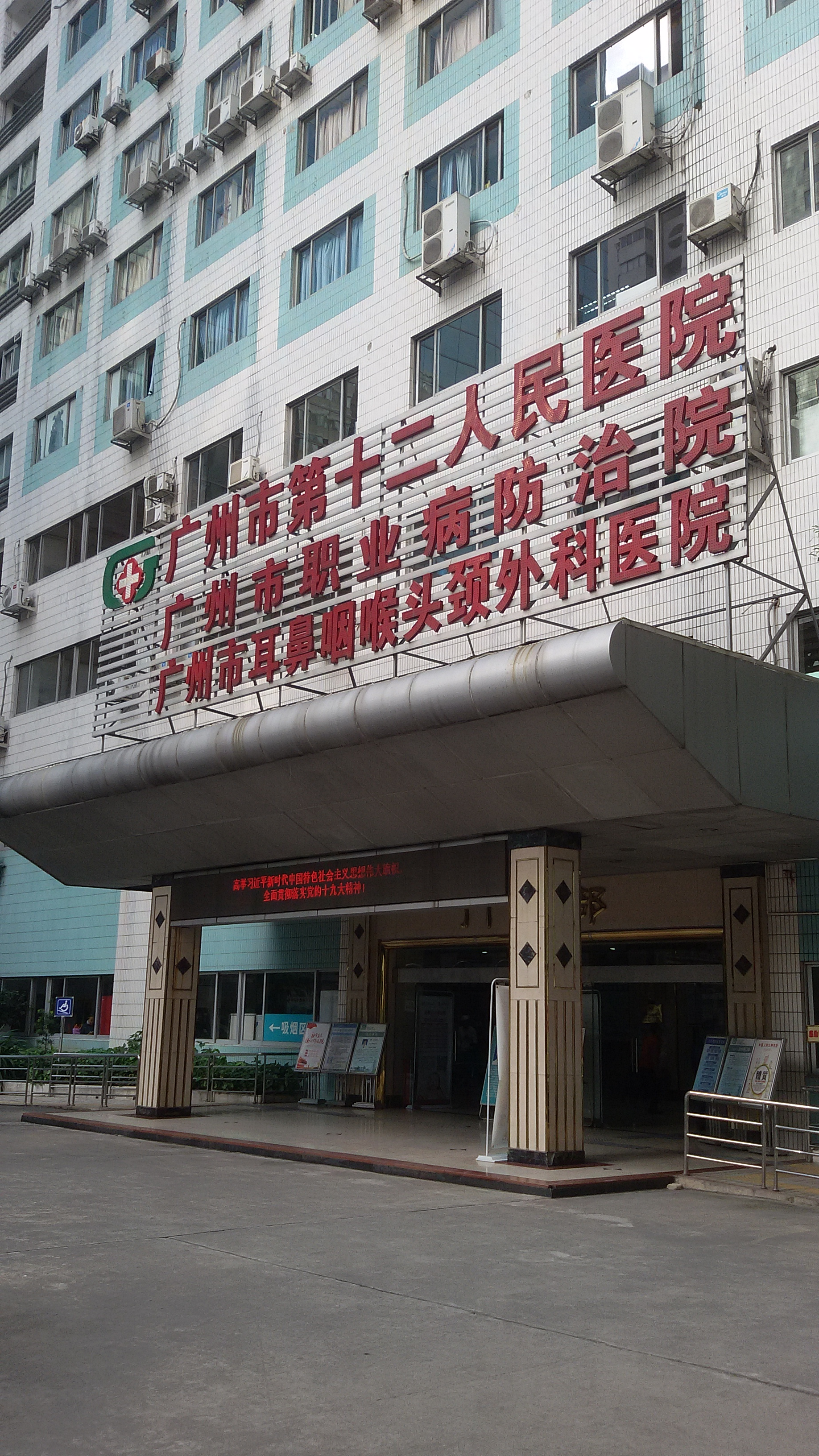 粵語: 廣州市第十二人民醫院（天河院區）